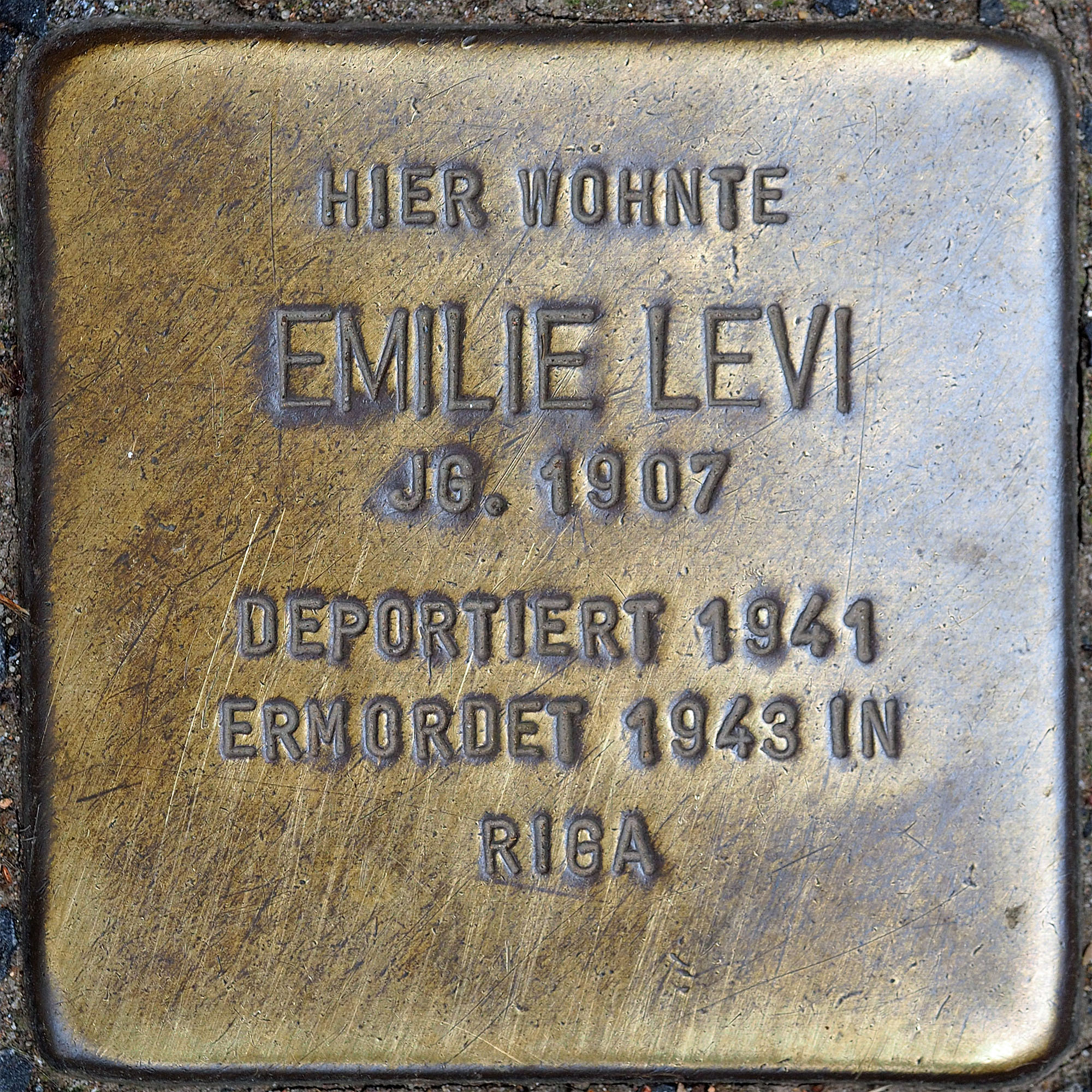 Stolpersteine MG: Levi, Emilie